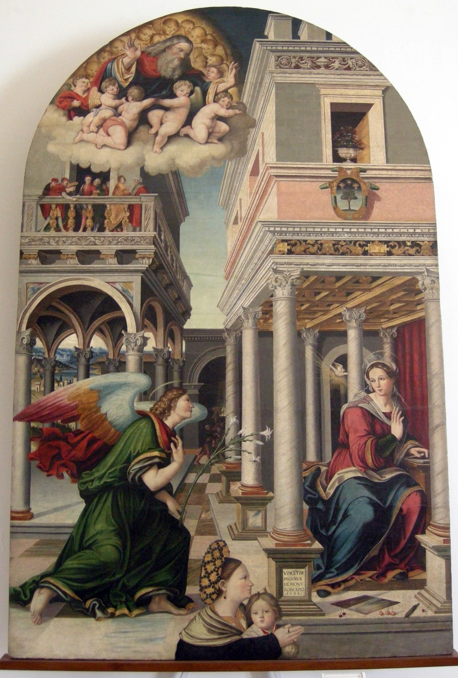 Palazzo Ducale di Urbino - Galleria Nazionale delle Marche - MIBAC This is a photo of a monument which is part of cultural heritage of Italy.